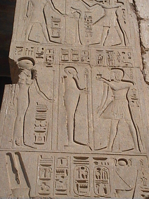 Relief figurant Ramsès III faisant une offrande d'encens au dieu Ptah et son épouse Sekhmet - Médinet Habou - XXe dynastie égyptienne